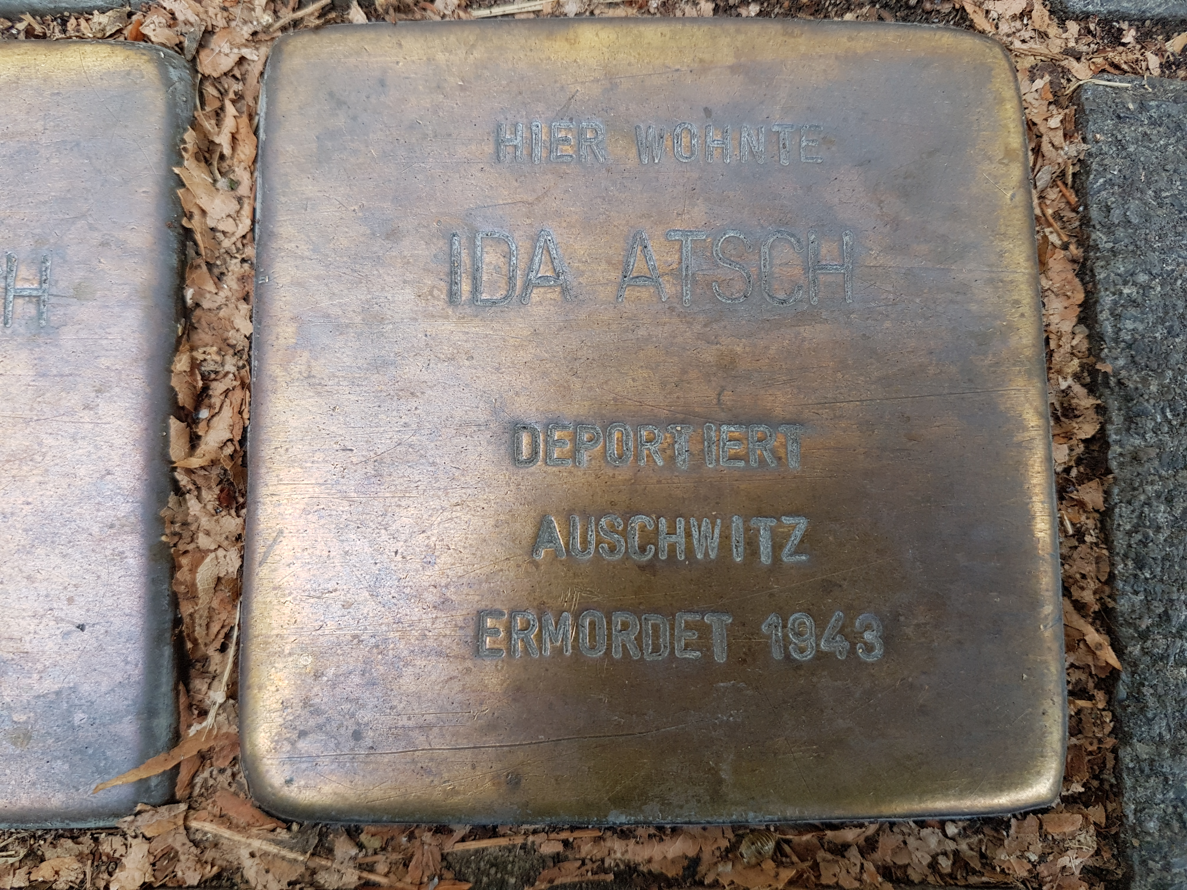 Stolperstein Duisburg Ida Atsch